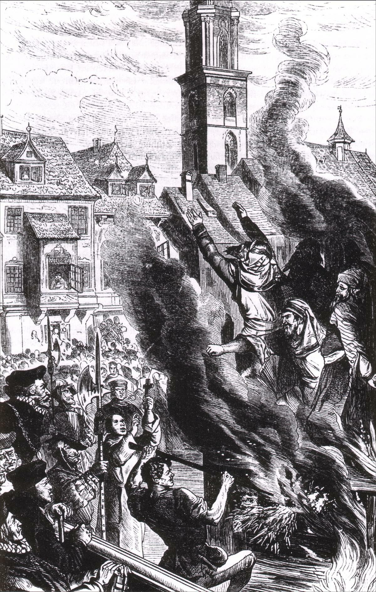 Verbrennung von Juden wegen angeblichen Hostienfrevels in Berlin 1510